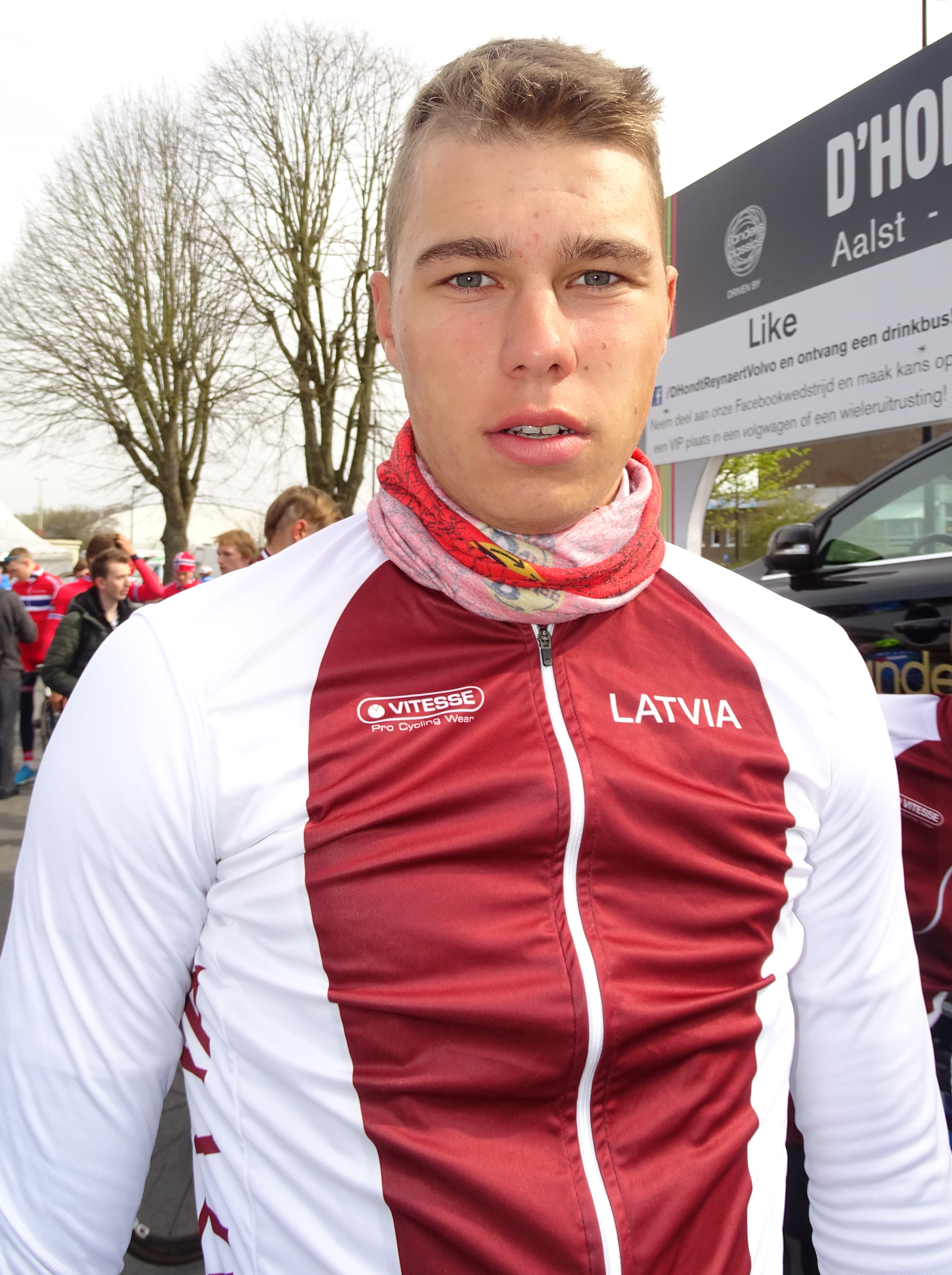 Reportage réalisé le samedi 9 avril à l'occasion du départ et de l'arrivée du Tour des Flandres espoirs 2016 à Audenarde, Belgique.